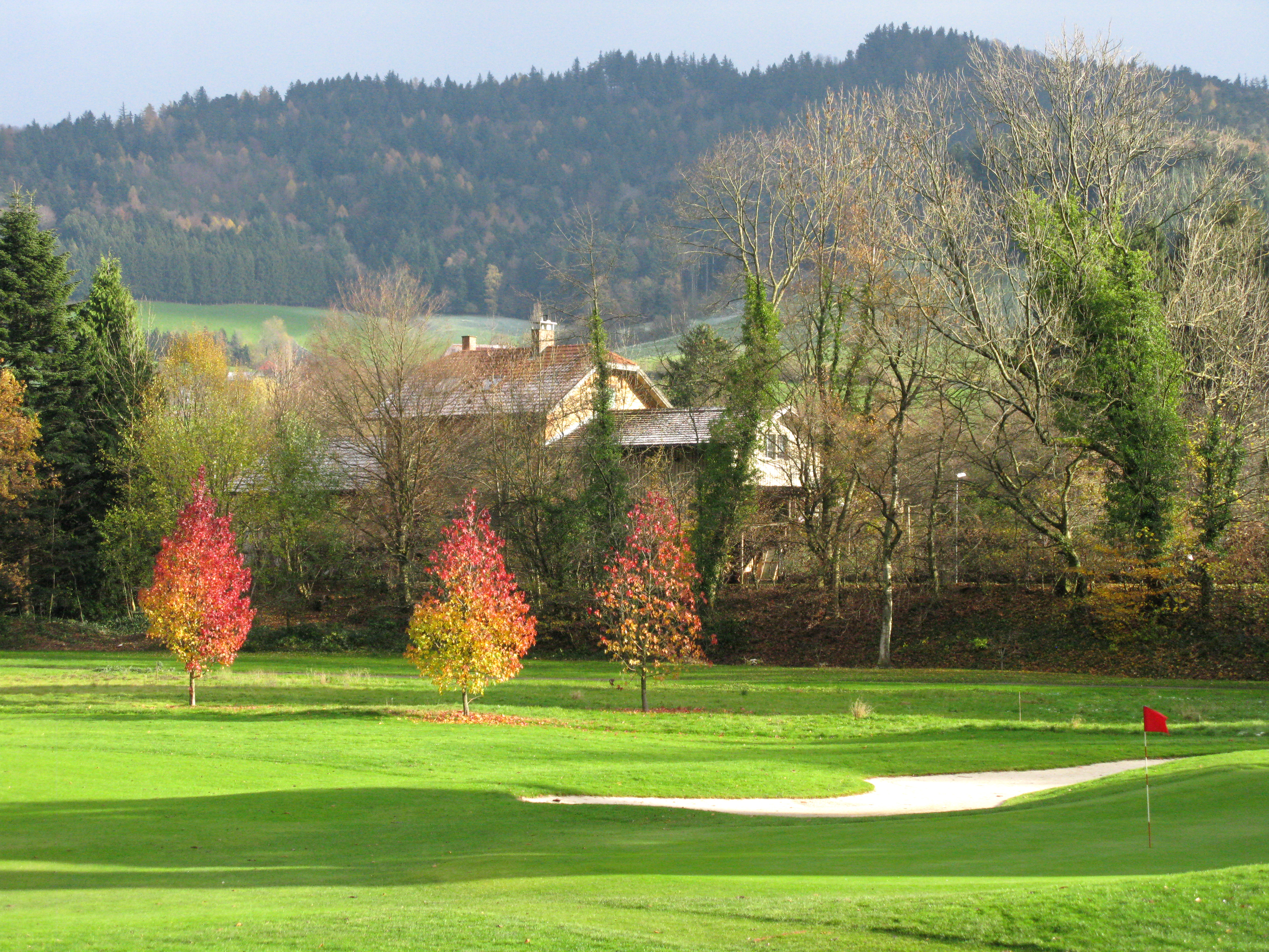 Golfplatz Gütermann, mit Bahnhof Gutach